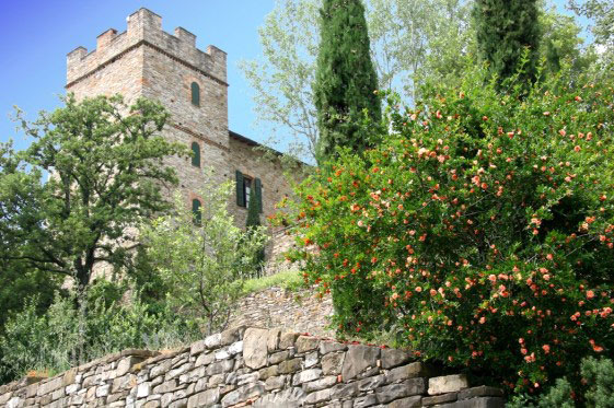 Il castello di Montechino nella Val Riglio